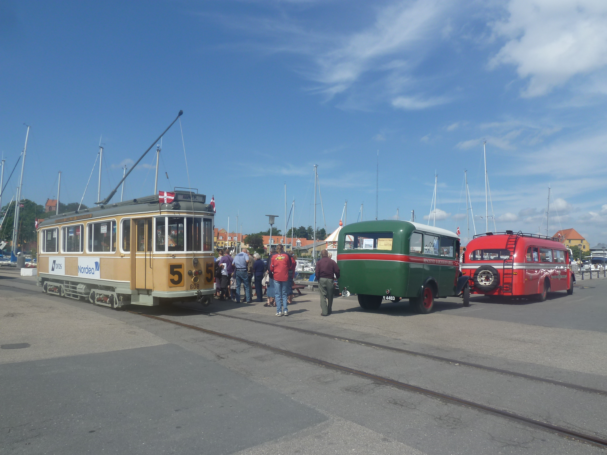 Old tram from Copenhagen, KS 608, belonging to Omstigningsklubben and heritage buses in Skælskør.